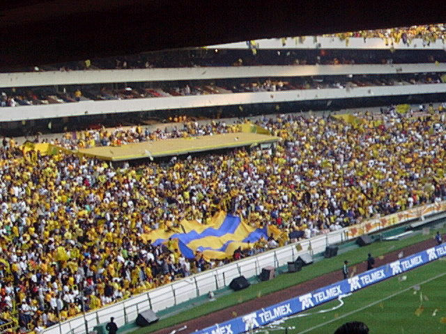 Estadio Azteca